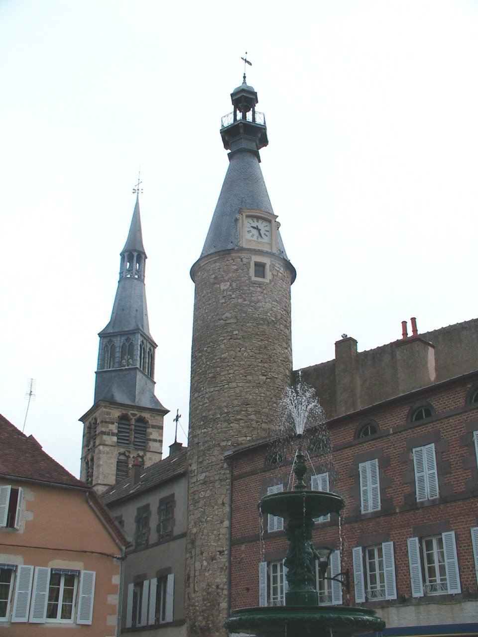 Saint-Pourçain-sur-Sioule (03), le clocher de l'église et la tour de l'horloge ("beffroi") Photo prise le 15 mai 2006 par F5ZV